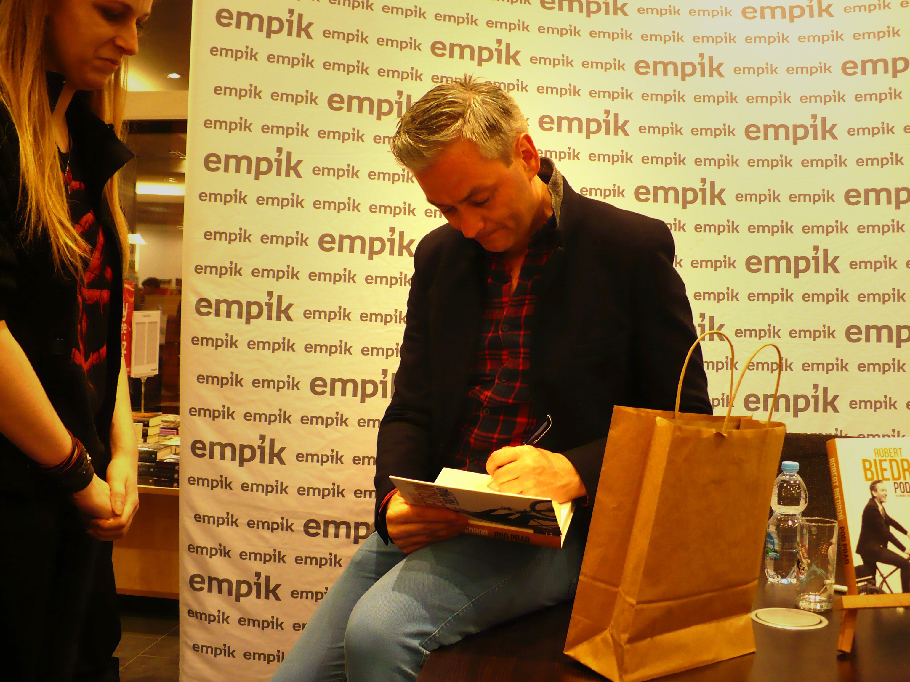 Robert Biedroń na spotkaniu z czytelnikami w bydgoskiej galerii Focus Mall, 28 stycznia 2017 roku